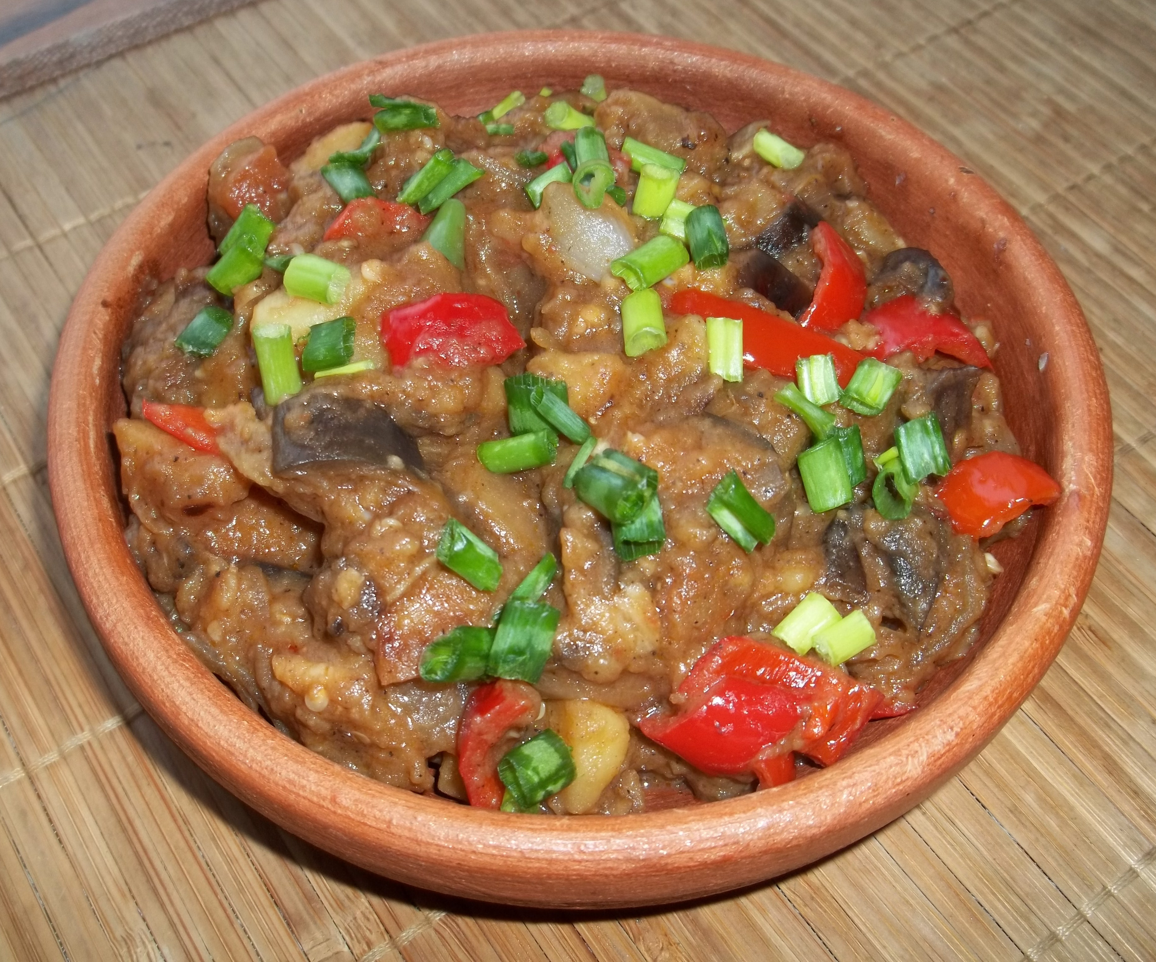 Аджапсандали